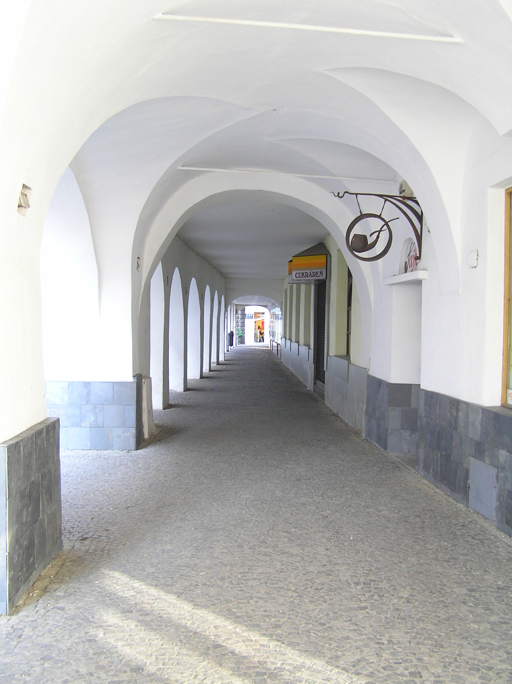 Radničná ulica Mariánske námestie, Žilina